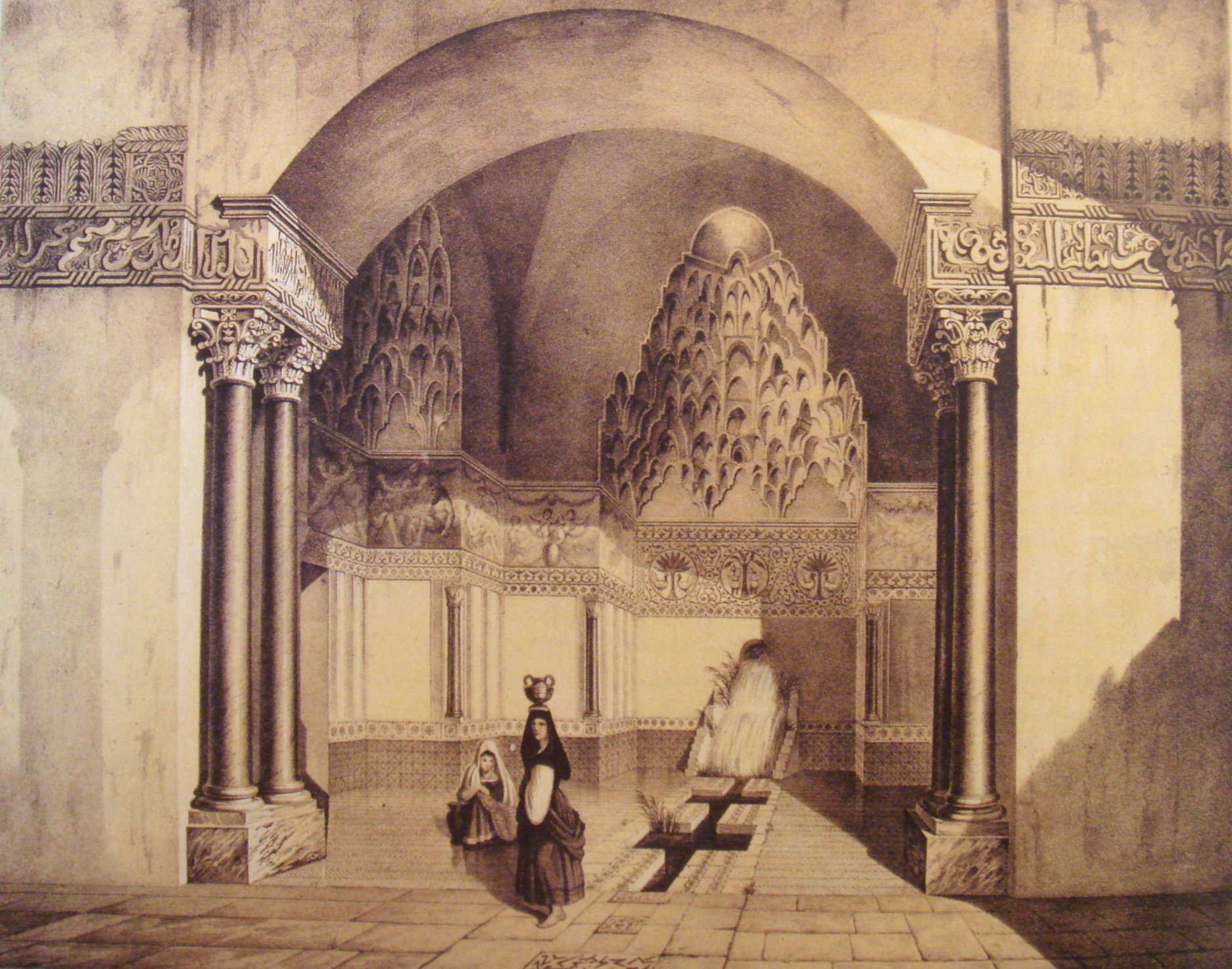 Arabo-Norman architecture (Probablement il s'ajit de LA Zisa à Palermo).